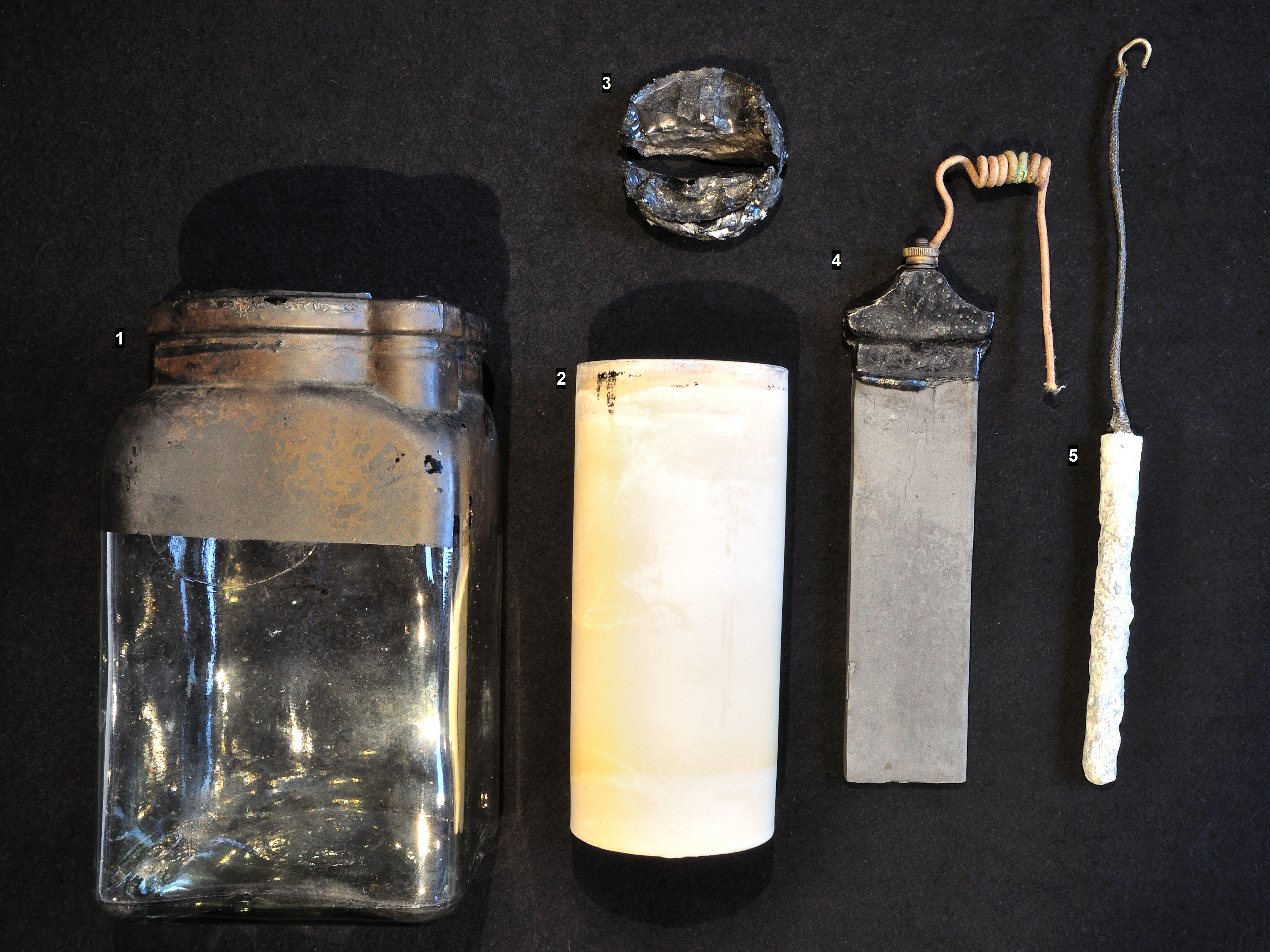 Einzelteile eines Leclanche-Elements. 1 Glasbehälter, 2 poröser Keramiktopf, 3 Vergußmasse, 4 Graphitelektrode, 5 Zinkelektrode.